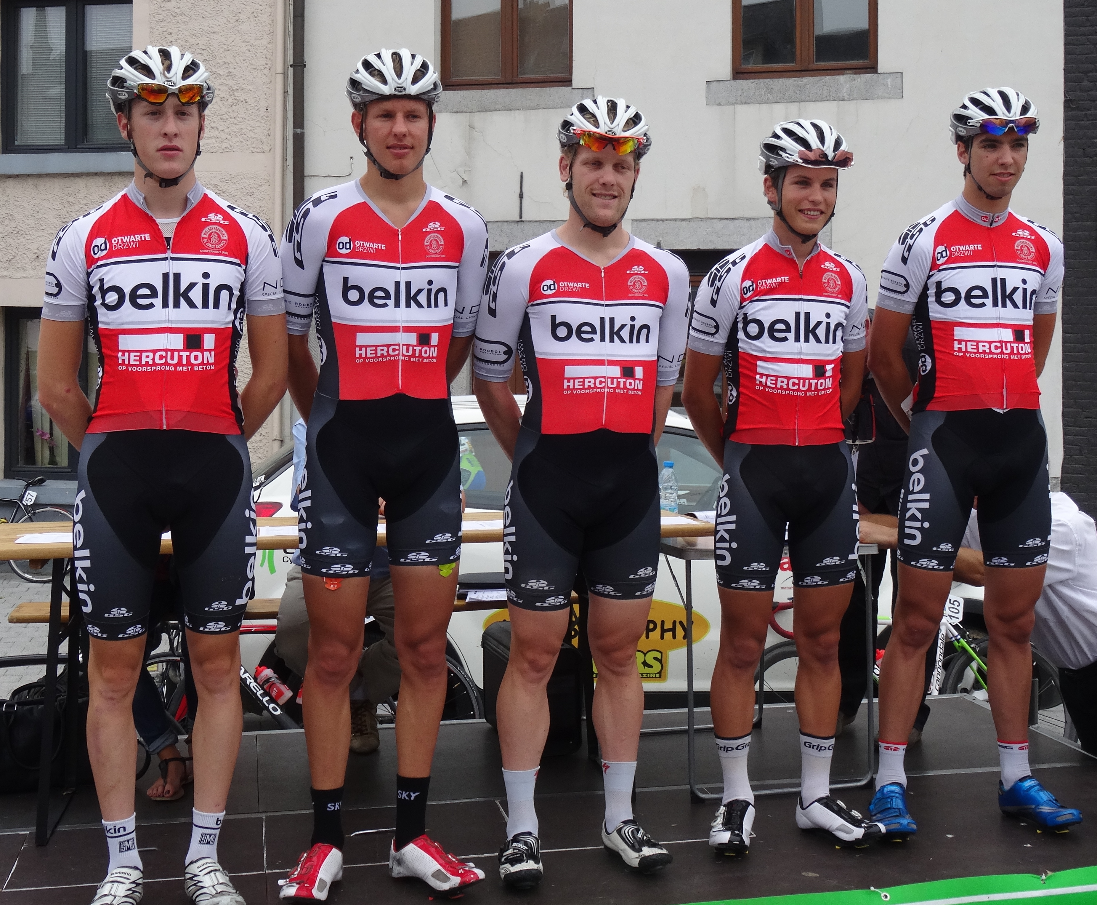 Reportage photographique réalisé le mercredi 6 août à l'occasion du départ de la première étape du Tour de la province de Namur 2014 à Jambes (Namur), Belgique.